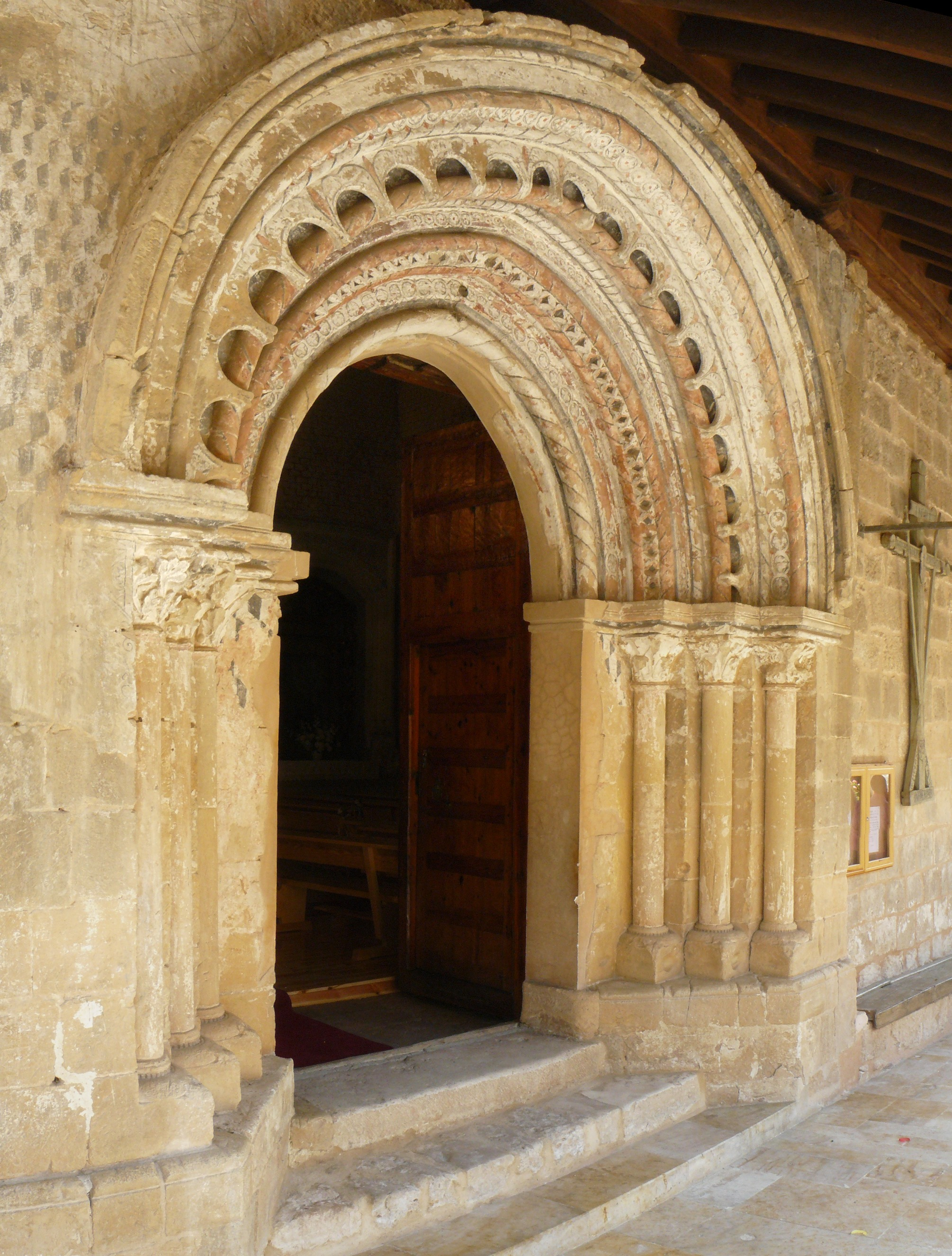 Portada de la iglesia románica de Nuestra Señora de la Asunción, Castillejo de Robledo, Soria.